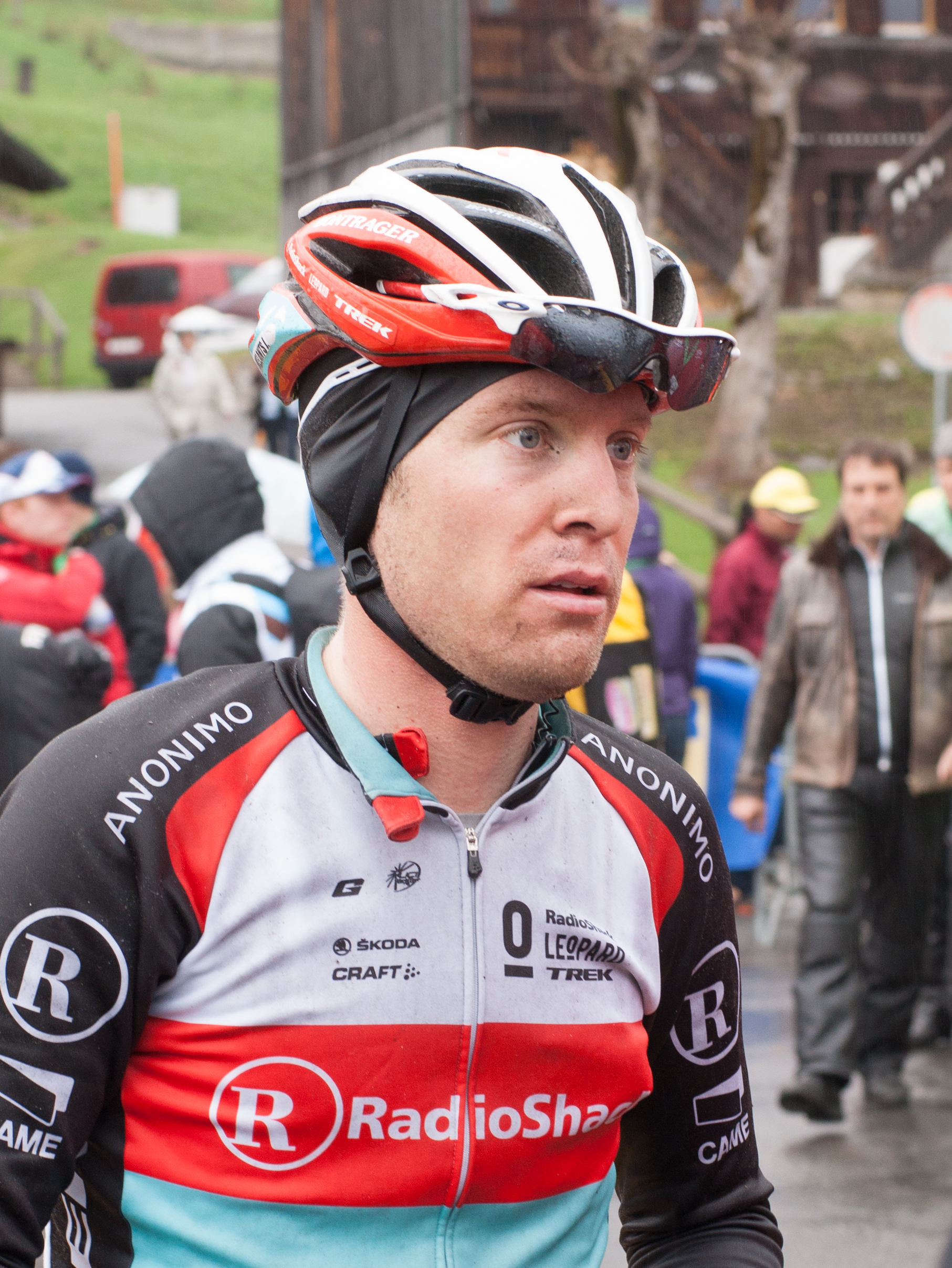 Tour de Romandie 2013, 4ème étape, Jan Bakelants